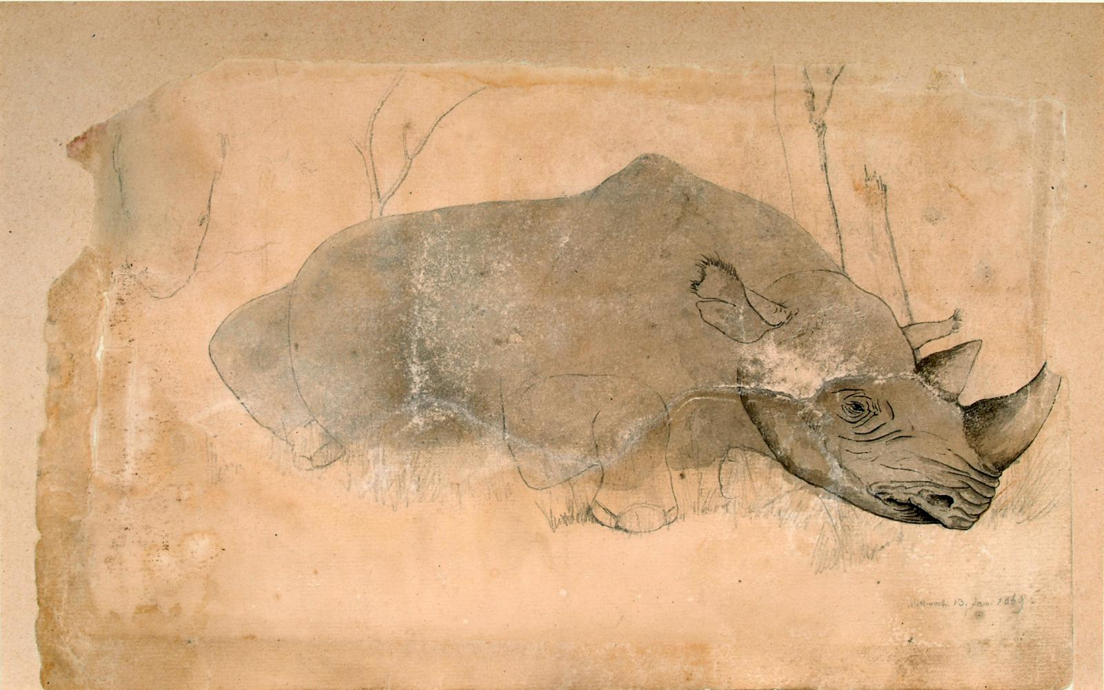 Q 2/12 Bü 28 Bild 1 Landschafts-, Pflanzen- und Tierzeichnungen sowie Zeichnungen der Ruinen von Simbabwe und unvollständige Notizen über diese Ruinen, angefertigt von Karl Mauch / o.D. [um 1869-1873]